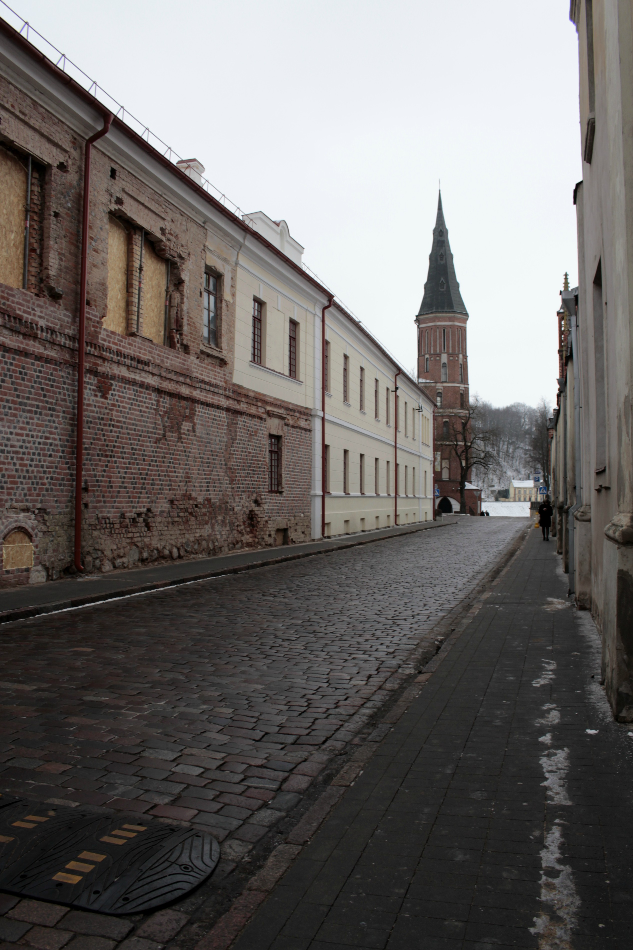 Didžiųjų kunigaikščių arba Kauno vaito namo restauracija.